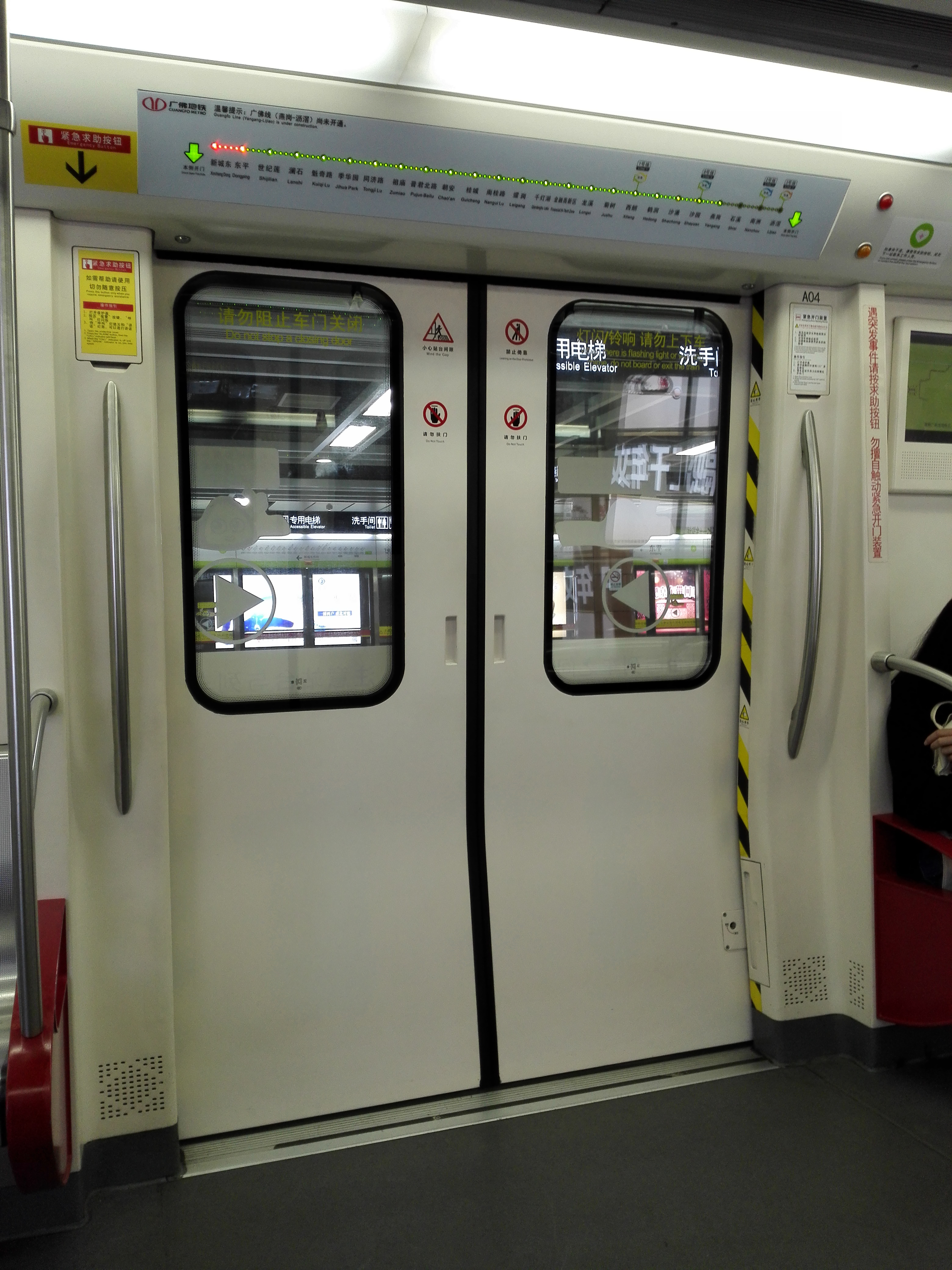 广佛线列车（B3）车门（广佛地铁二期开通后）